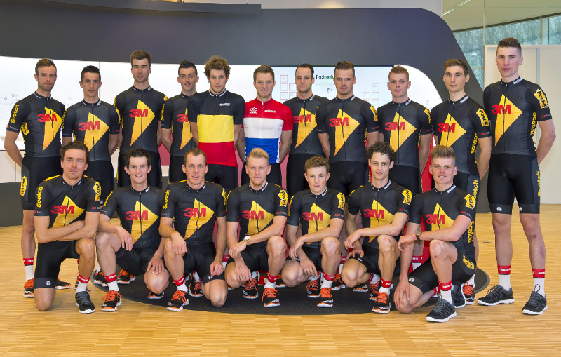 The full riders team of Team3M in 2016.